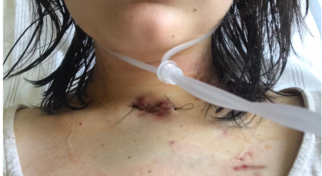 Cierre de traqueostomia, despues de trasplante de pulmon, cirugia que se efectuo ya que al desentubarla necesitaba apoyo de oxigeno que se hizo a traves de la traqueostomia. Cirugia que le permitio adaptarse lentamente a sus nuevos pulmones.